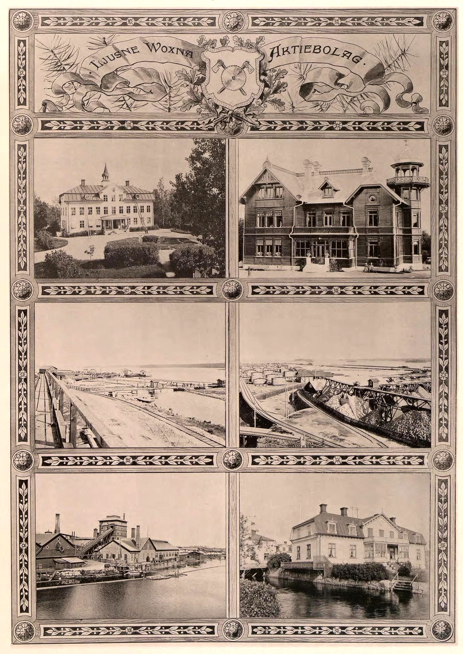 Ljusne-Woxna Aktiebolag